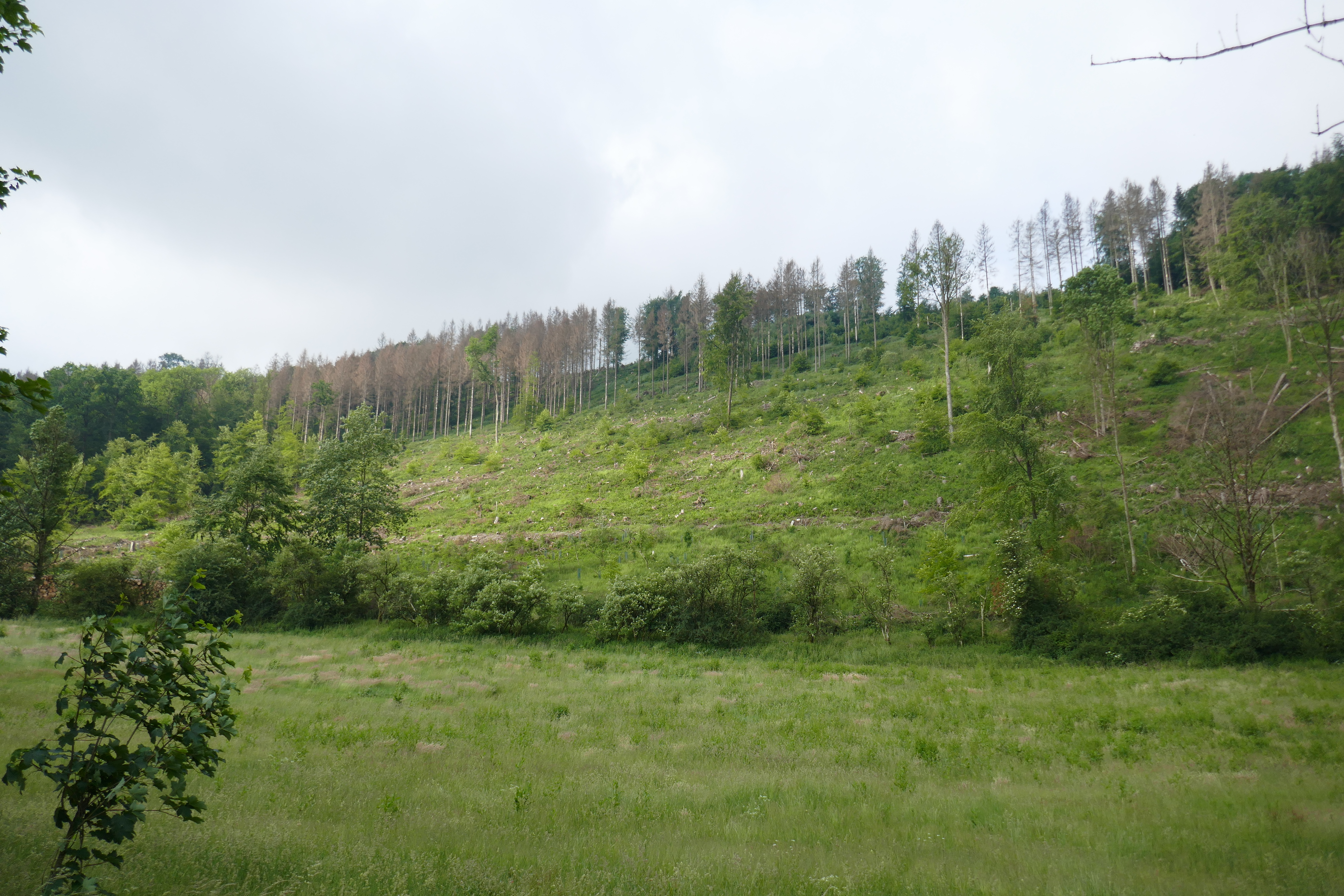 Dunetal bei Neuenbeken, Fichtensterben im Paderborner Stadtwald